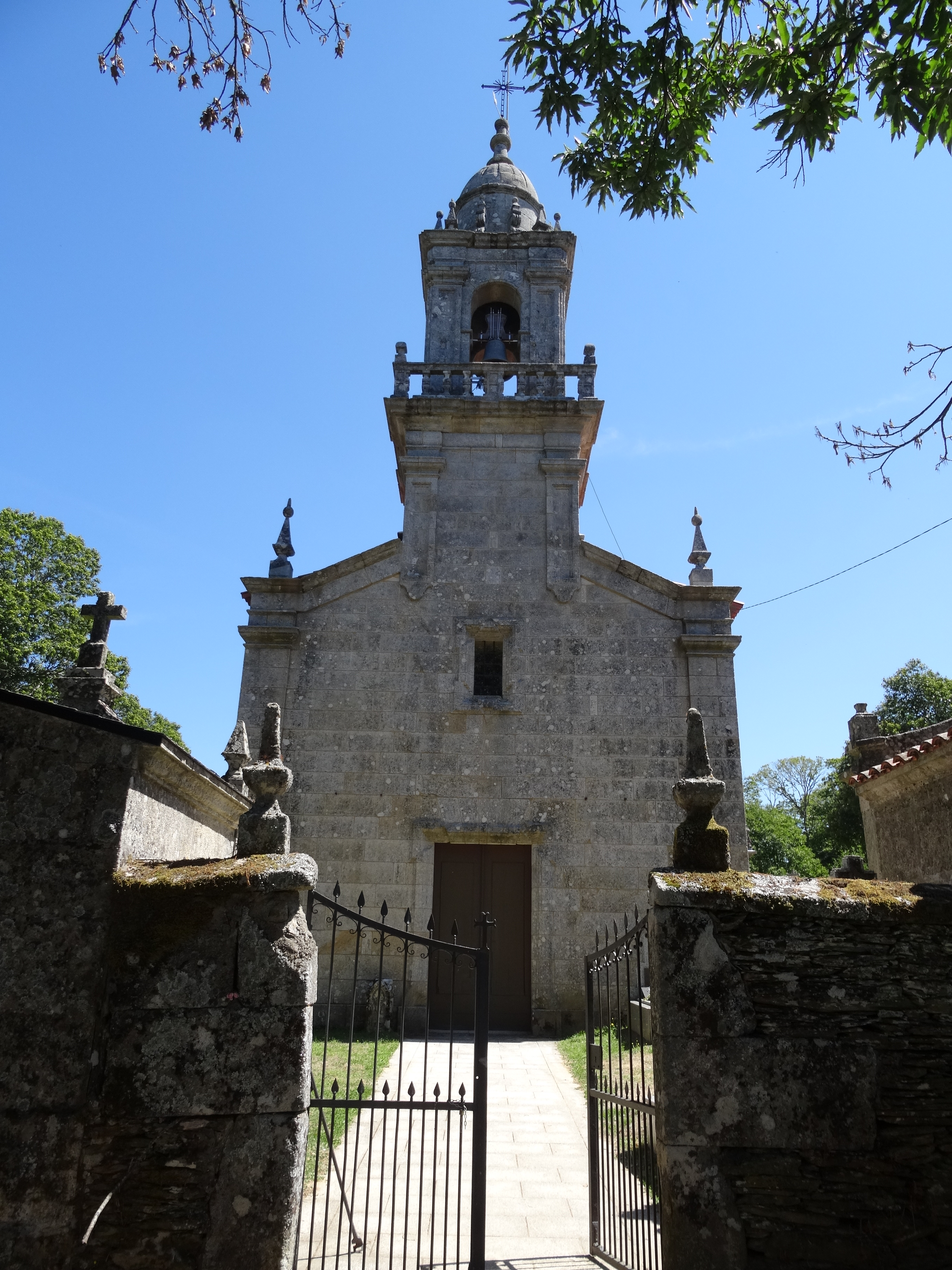 Igrexa de Sta. María de Riós, Ourense.